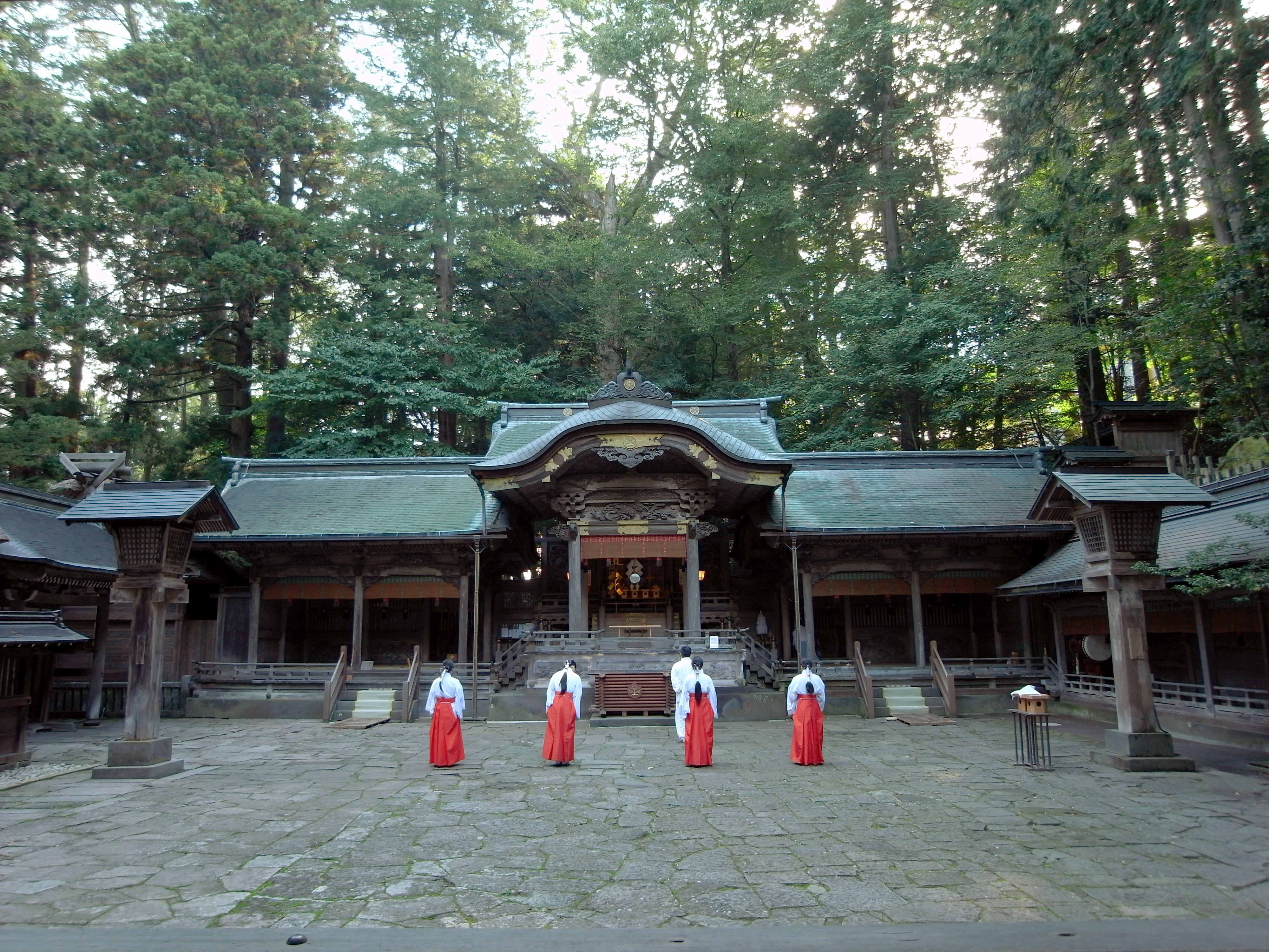 諏訪大社 本宮